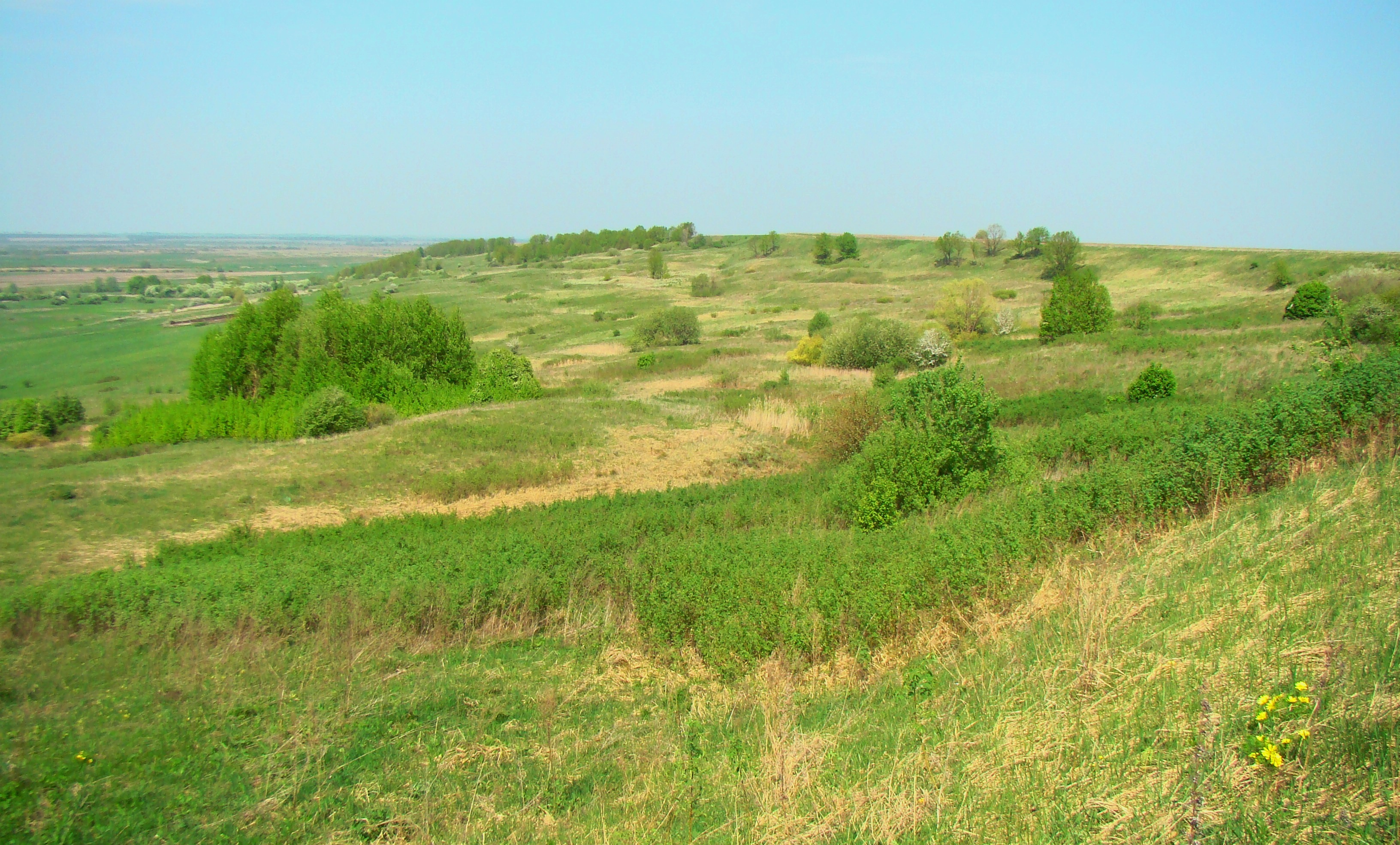 Степные участки по р. Рудня, Починковский район This image is related to the protected area of Russia number 5210465